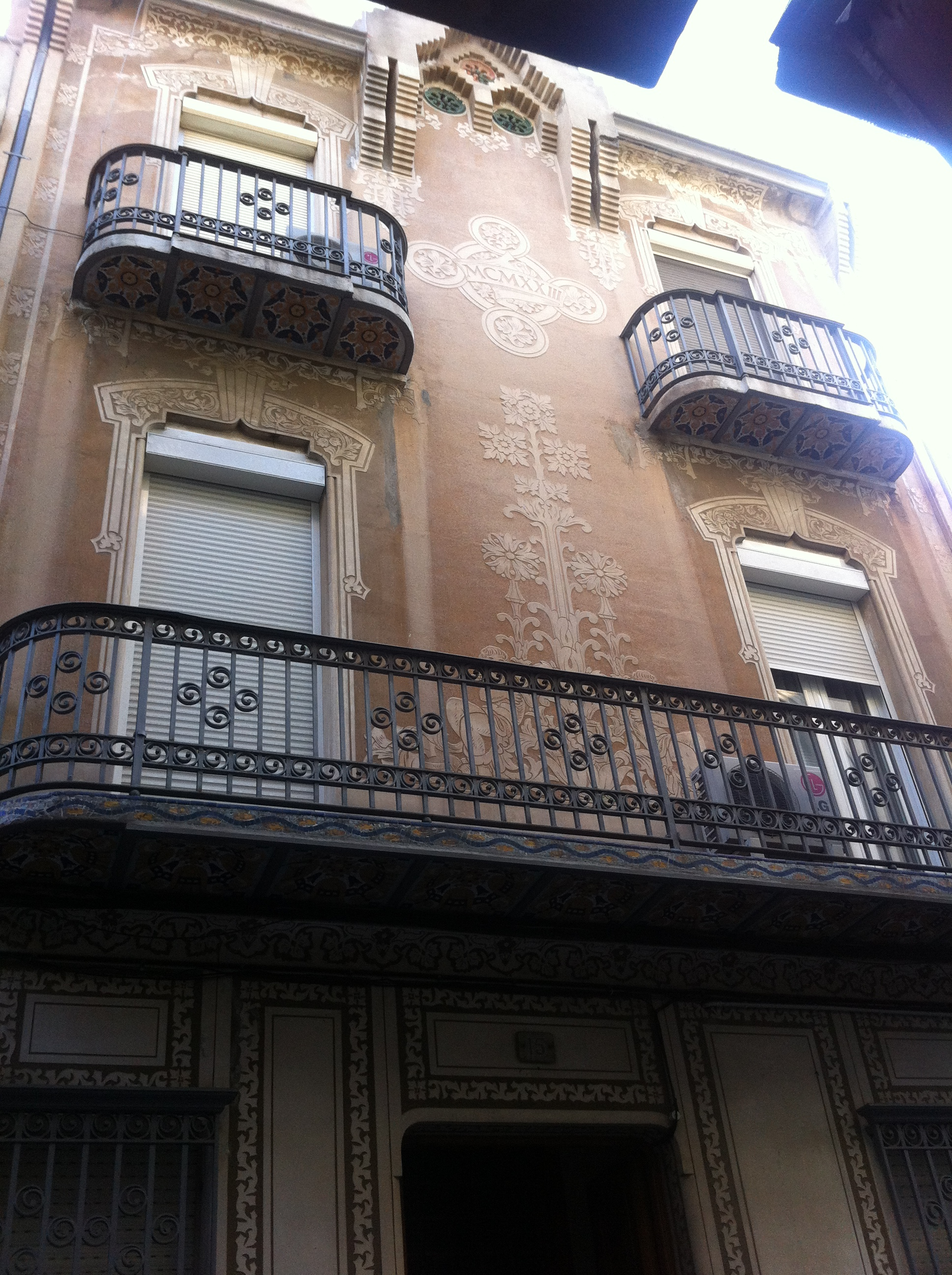 Casa Francesc Prat i Bosch